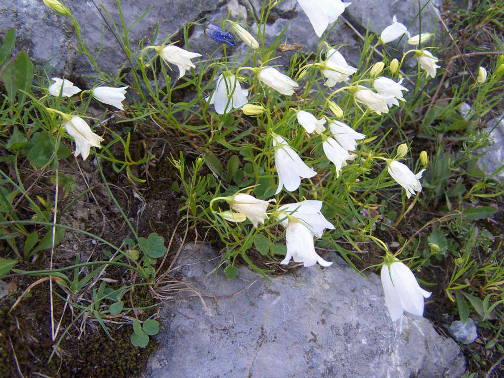 Campanula polymorpha (pl. dzwonek wąskolistny), habitat:Tatra Mountains, Dolina Gąsienicowa